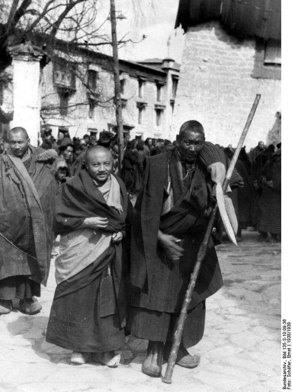 Lhasa, Neujahrsfest